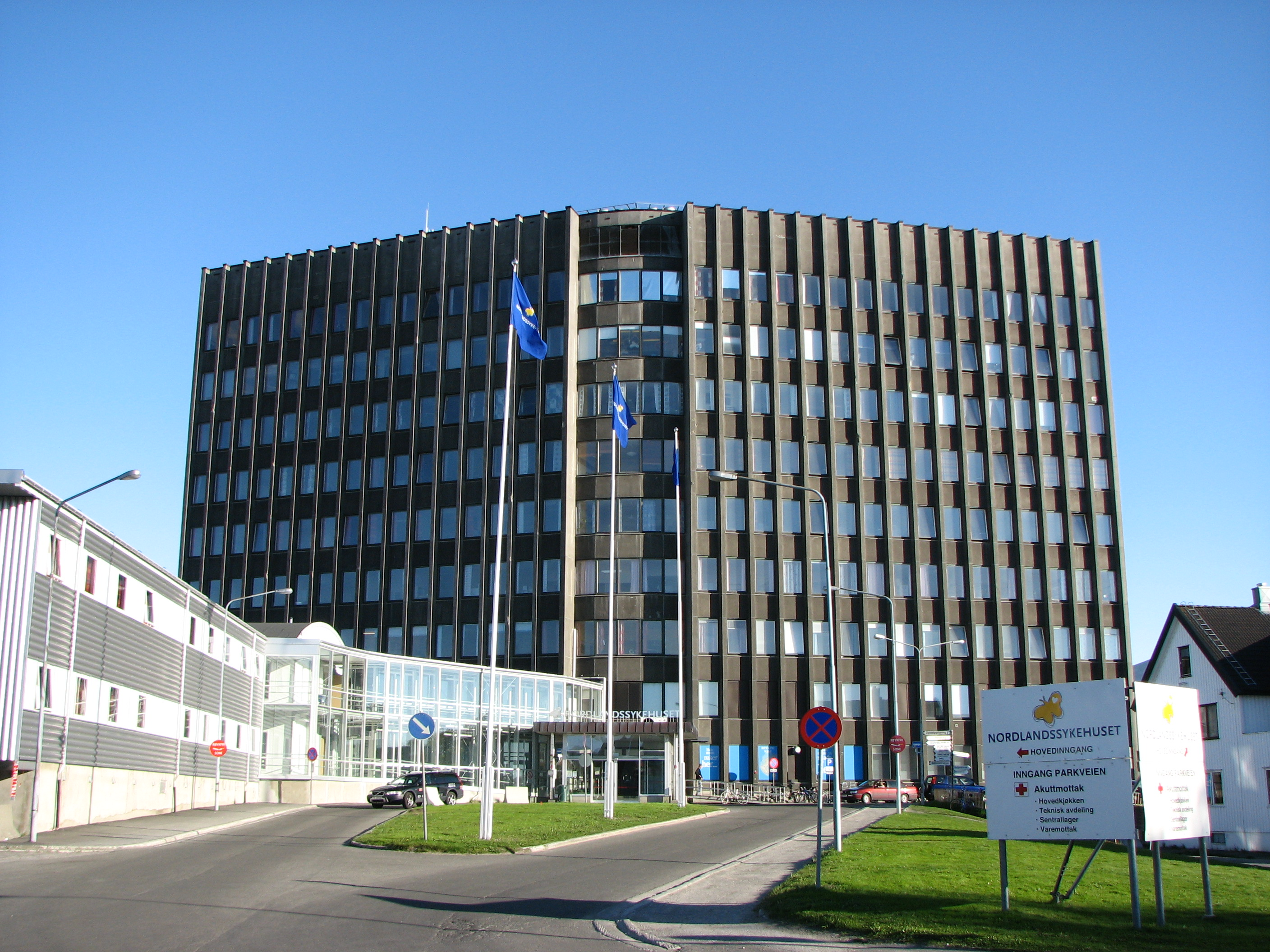 Nordlandssykehuset Bodø sentrum